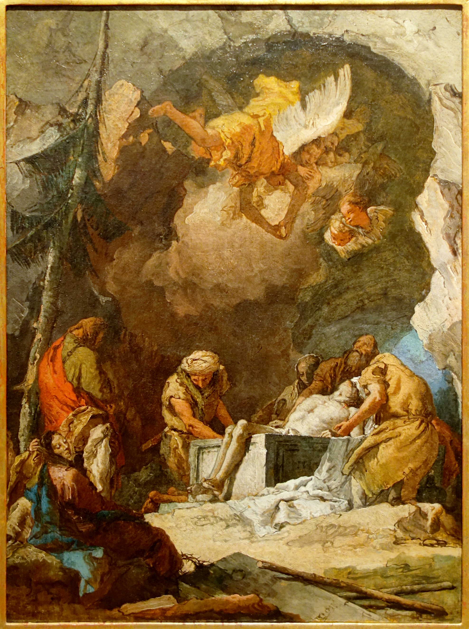 Giovanni Battista Tiepolo - Deposizione di Cristo nella tomba - Museu Nacional de Arte Antiga - Lisboa